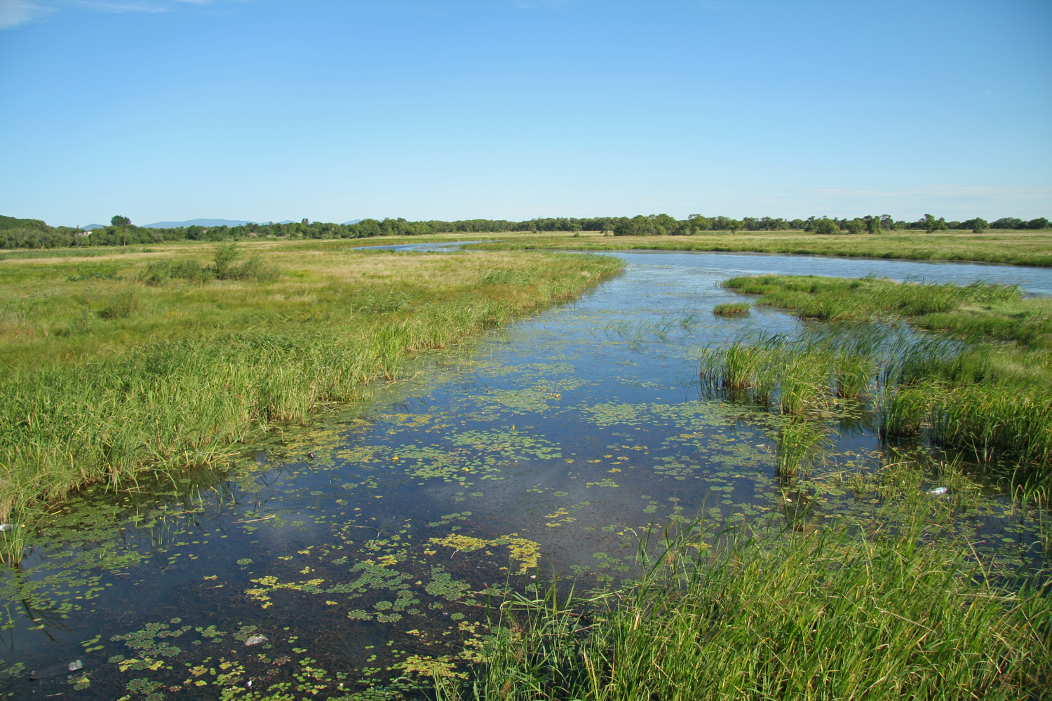 Протока под мостом, берег Ханки